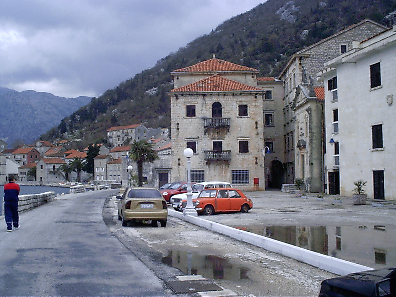 Perast, Montenegro085 Perast